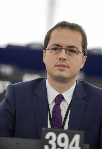 Andi Cristea